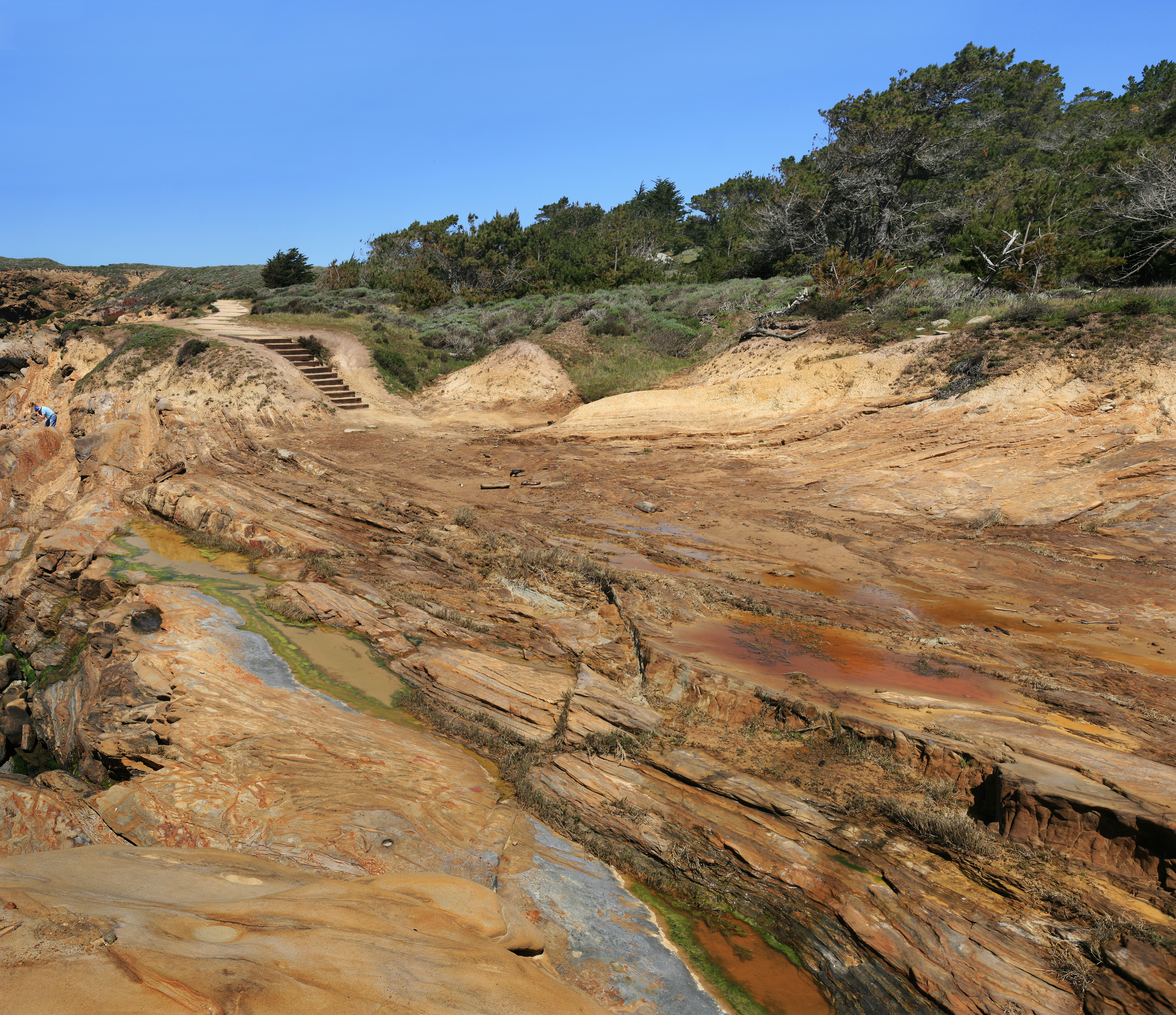 Point Lobos